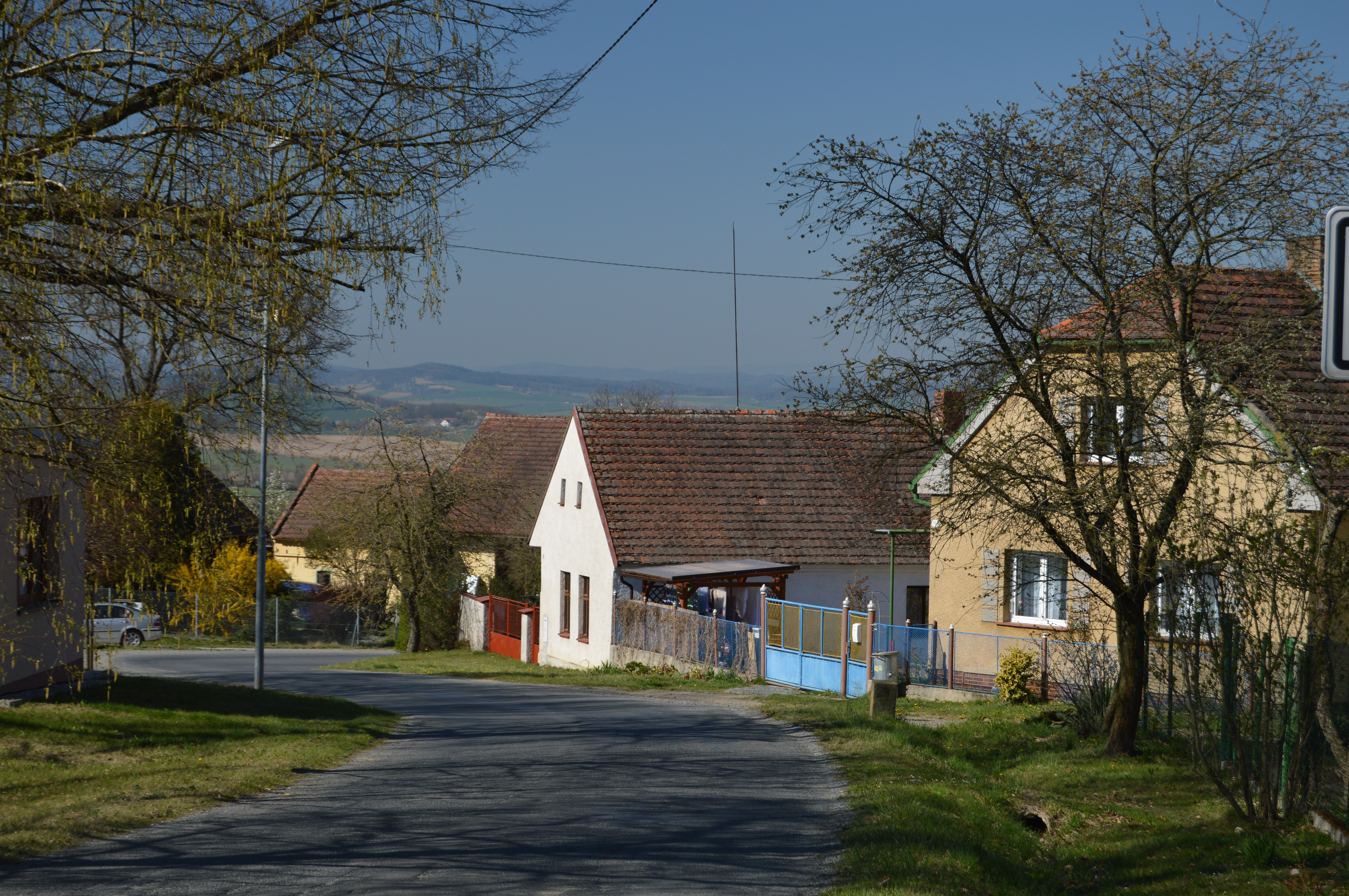 Plevňov, příjezd směr od Libákovic